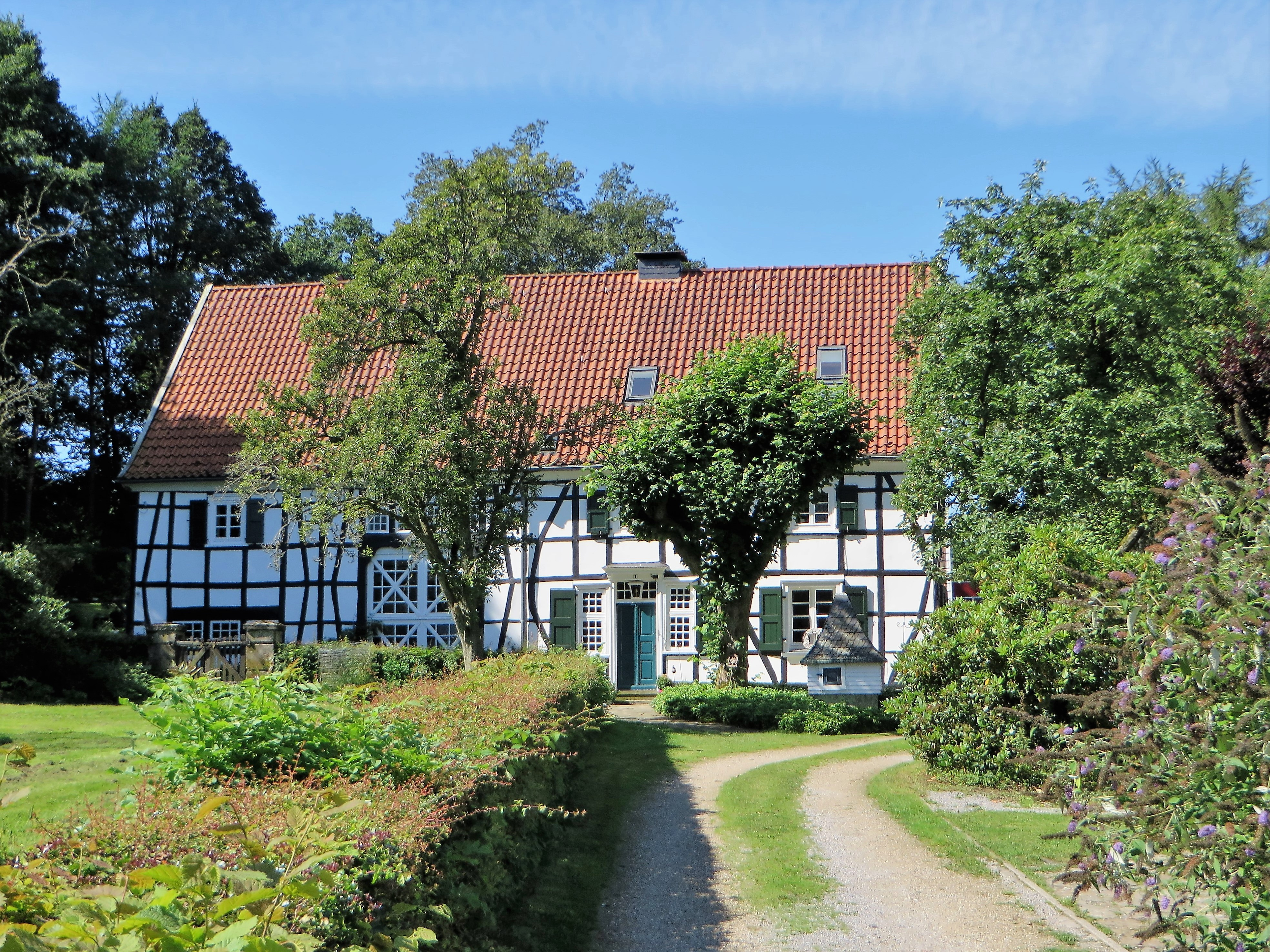 Denkmalgeschütztes Fachwerkhaus in Sprockhövel-Gennebreck, Auf dem Schee 1. Hof Overkamp (ehemaliger Hof „Mittelste Schee“). This is a photograph of an architectural monument.